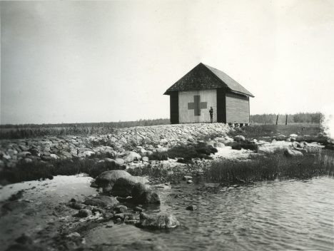 Ruhnu päästejaam valmis Sjustaka neemel 1876. aasta lõpuks